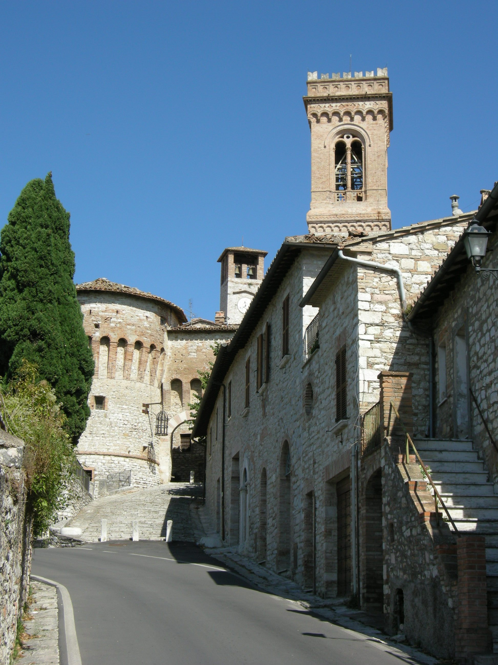 Corciano, porta e fortificazione